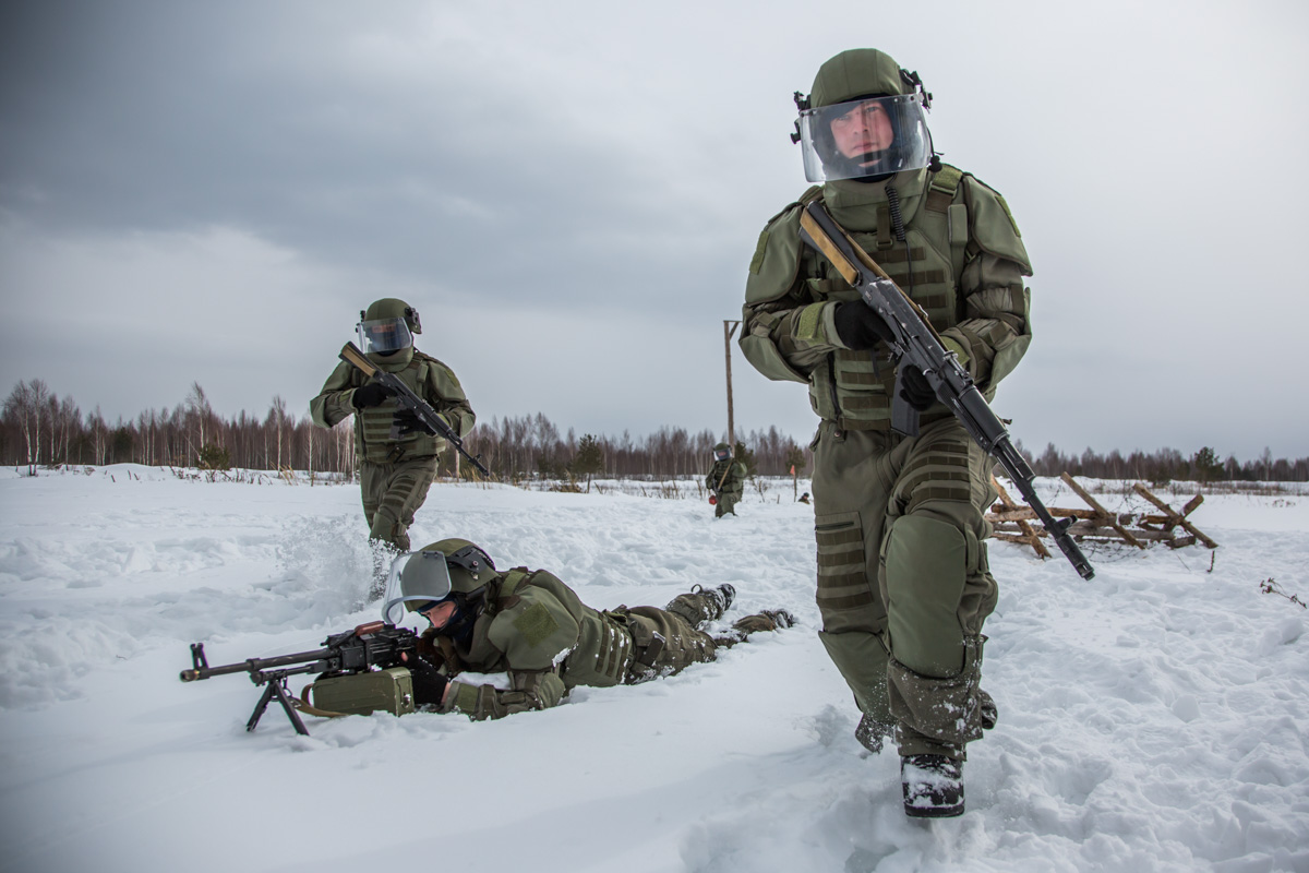 В Мулино сапёры-штурмовики 1-й гвардейской инженерно-сапёрной бригады отработали действия по проделыванию проходов в минных полях.